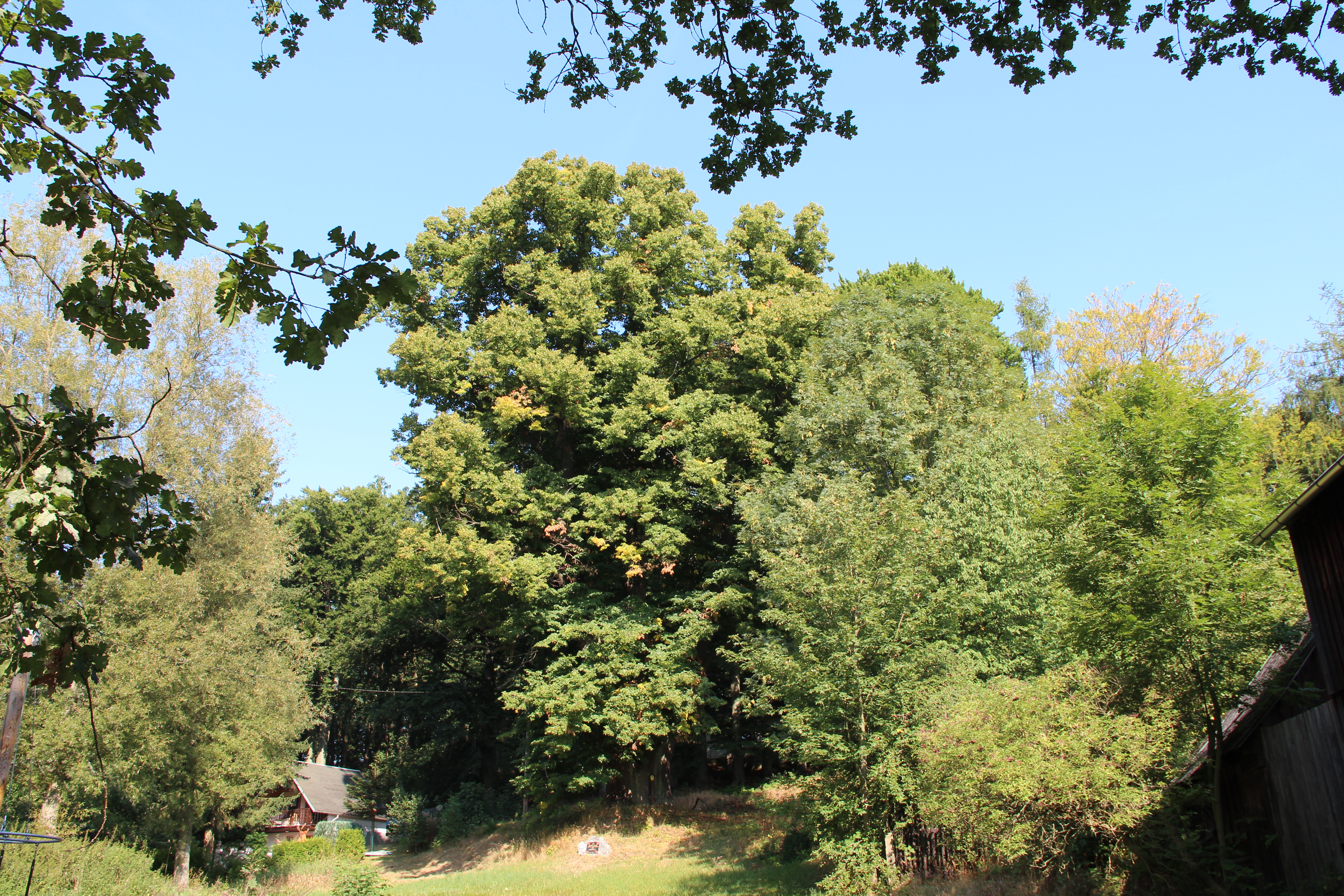 Körnerlinde in Eichigt (Vogtland, Sachsen), 2012